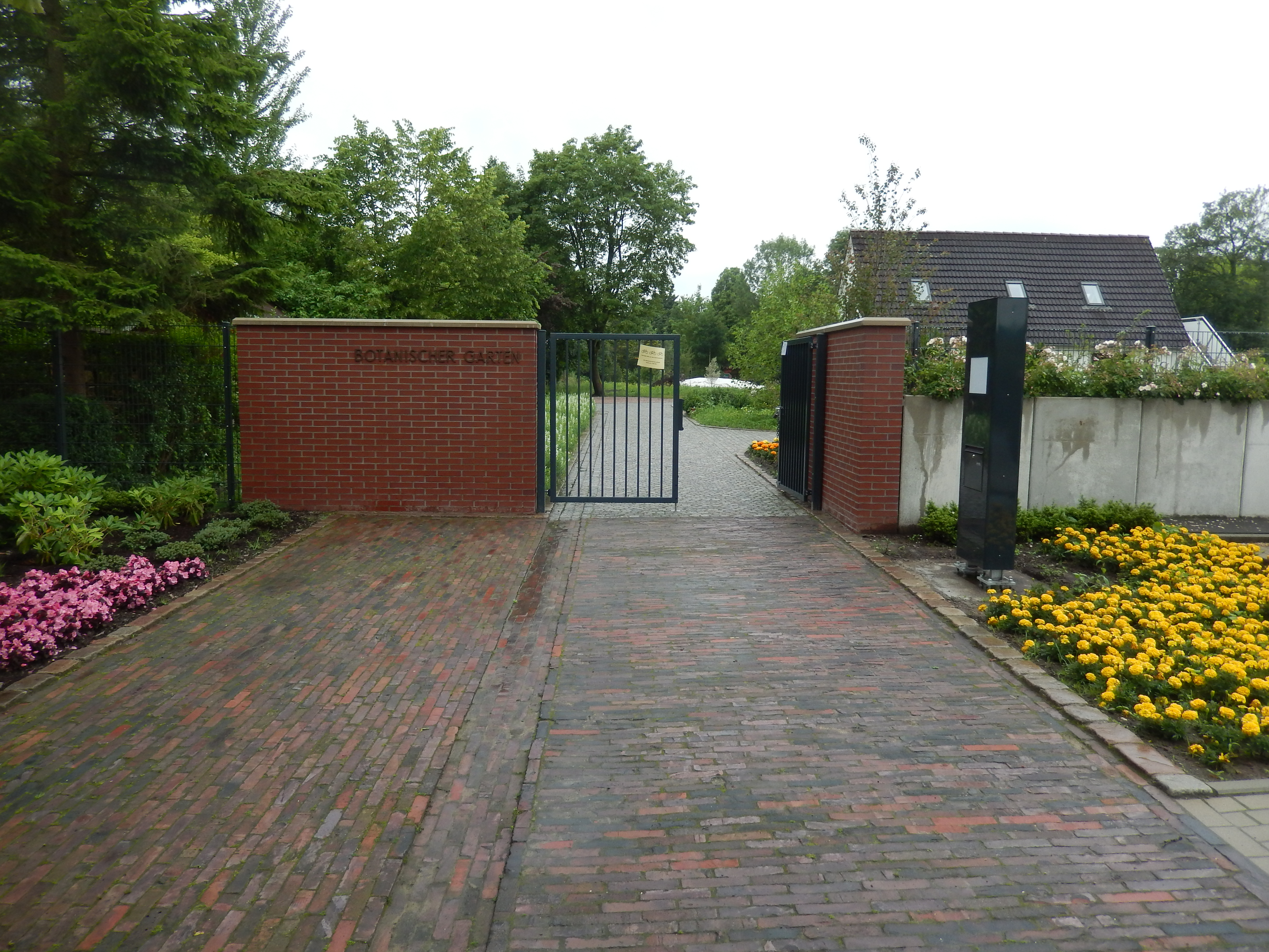 Botanischer Garten Wilhelmshaven beim Rosarium